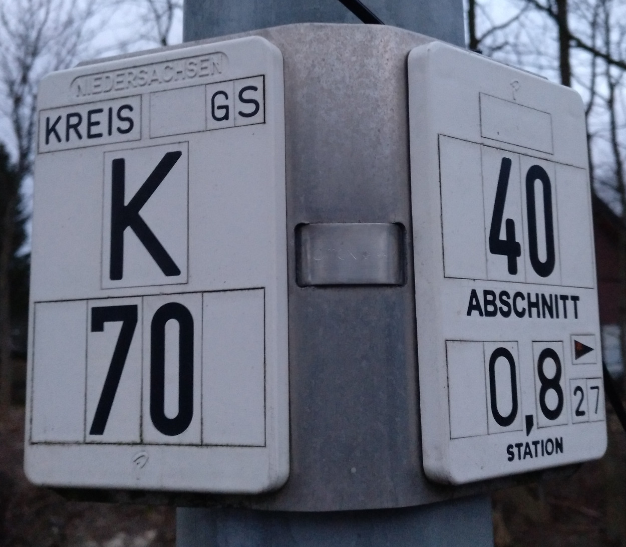 Stationszeichen K70 in Bad Harzburg OT Bündheim im Landkreis Goslar.